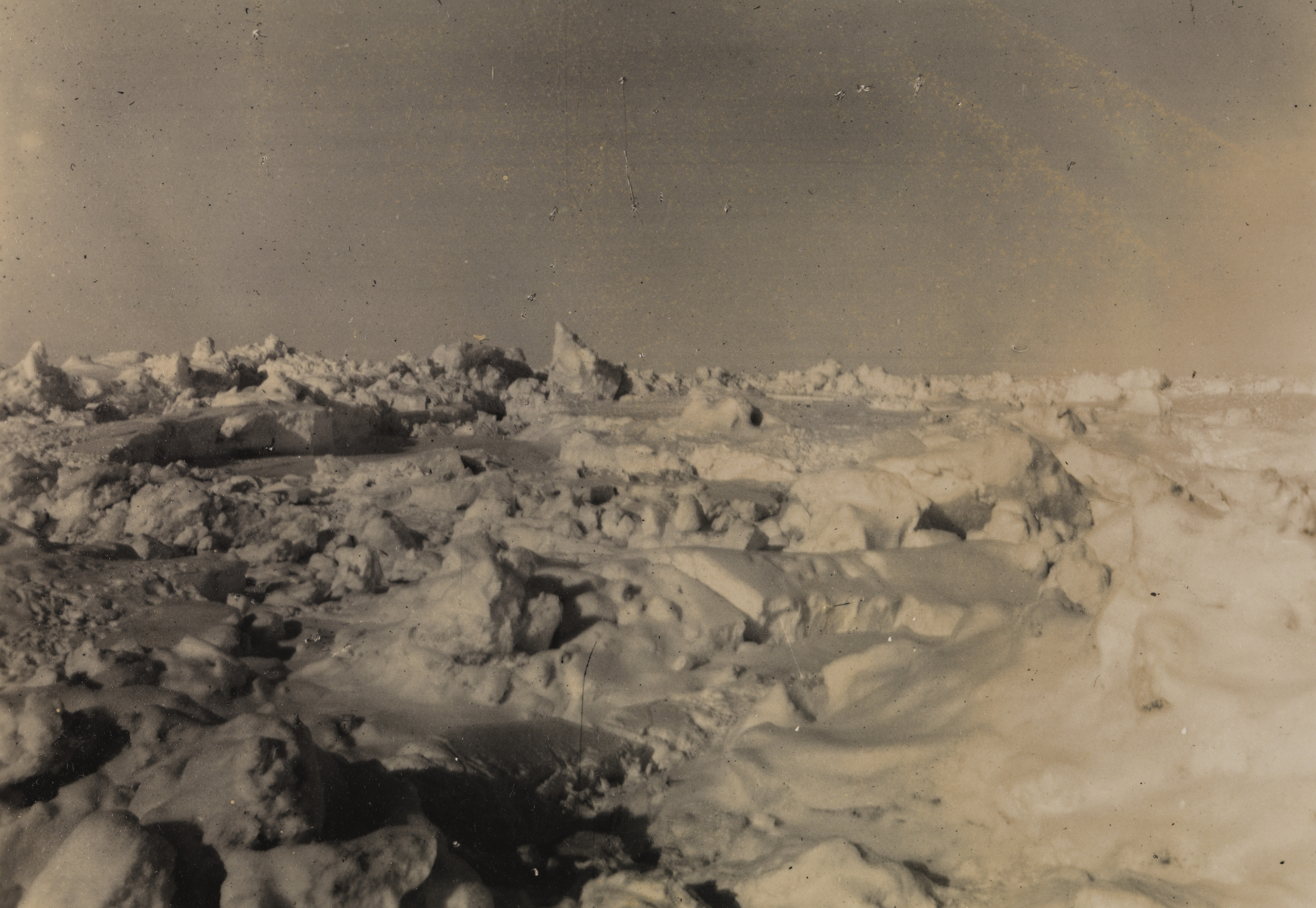 Polarlandskap. Isforholdene om våren. Ett av bildene fra ekspedisjonen med polarskip mot Nordpolen i perioden 24 juni 1893 til 13 august 1896. Etter planen skulle skipet drive i isen med havstrømmer fra Sibirkysten over Nordpolen mot Grønland. Depicted place: Polhavet